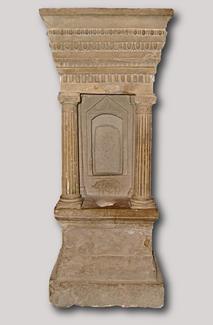 Chapelle miniature punique (naïskos) exposée au Musée national du Bardo (Tunisie)